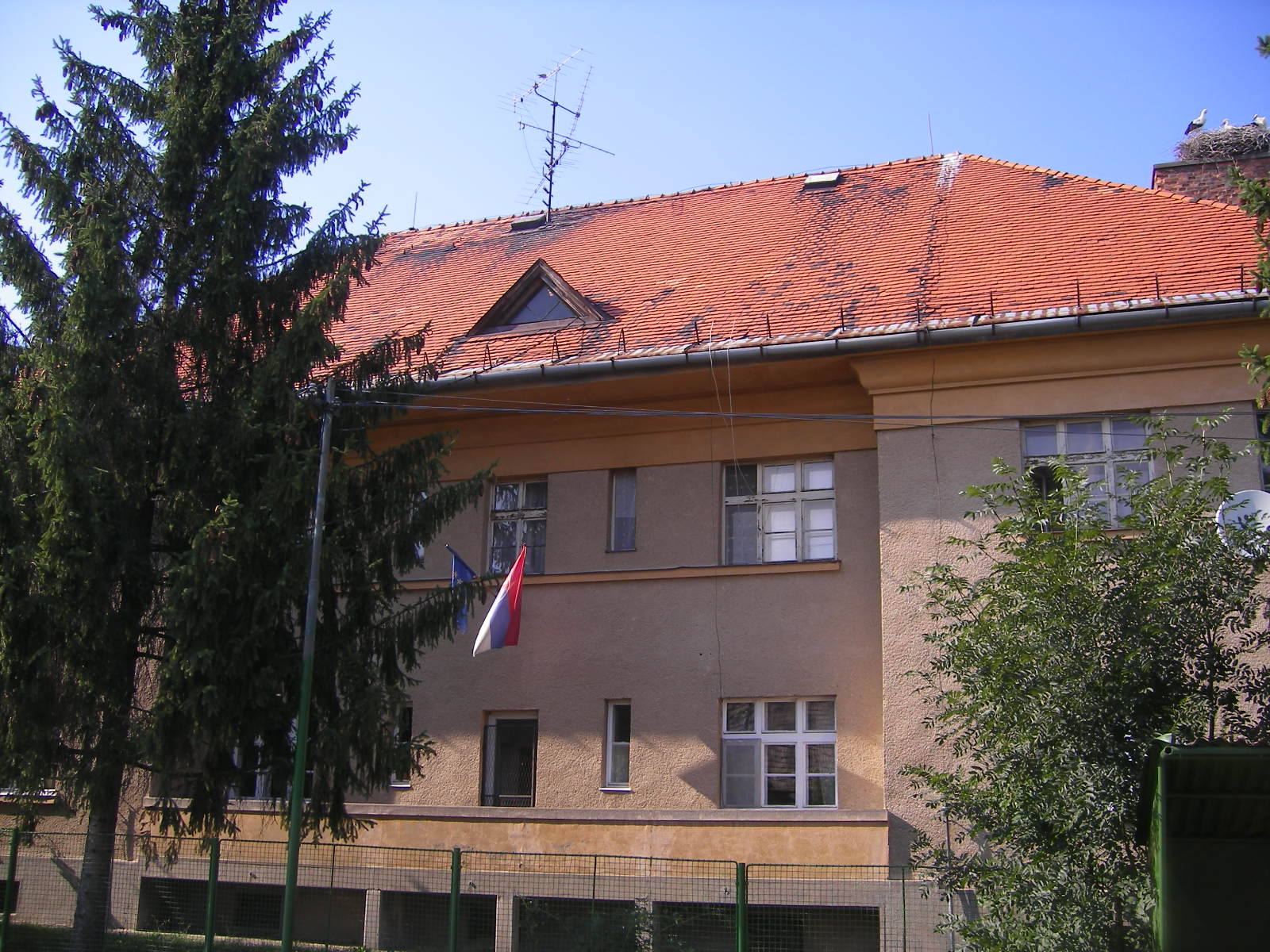 Ipolybalog - községi hivatal